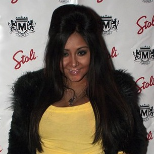 Nicole "Snooki" Polizzi attending a party in Chicago